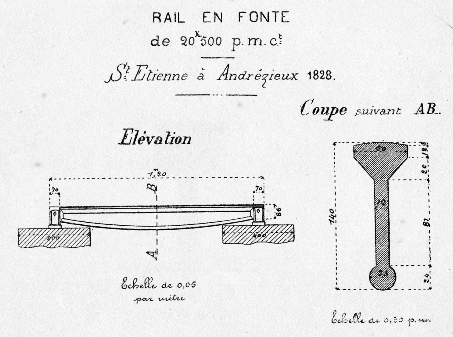 Rail utilisé en 1828 sur le chemin de fer de Saint-Étienne à la Loire (Andrézieux)